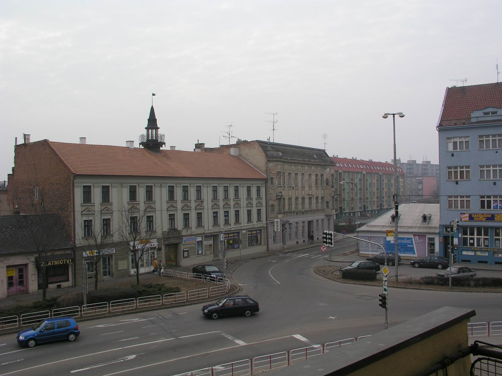 Městský dům - Černý dvůr, Poděbradovo nám. 1377/8